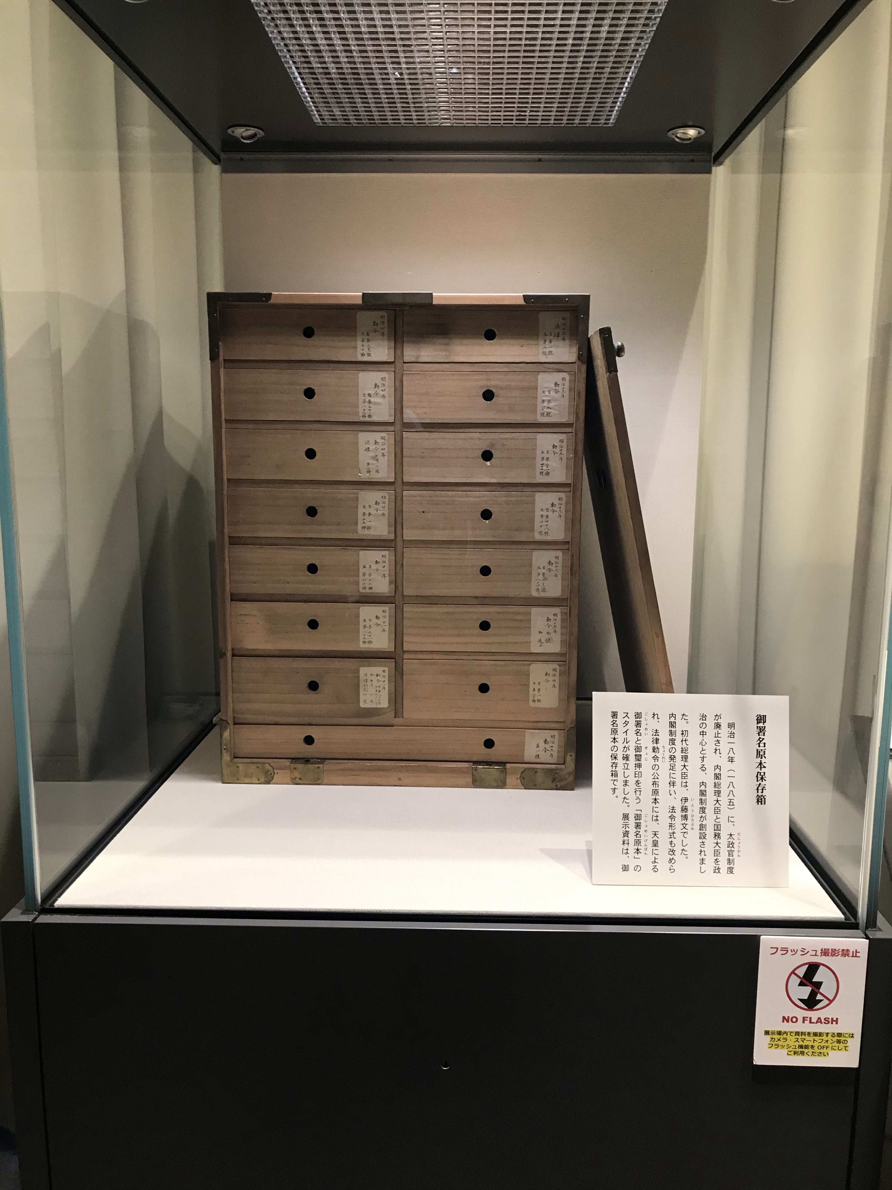 「御署名原本」（御署名・御璽付の法律勅令公布原本）を保存した箱（国立公文書館）